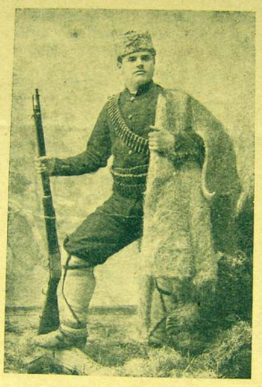 Коста Василев.